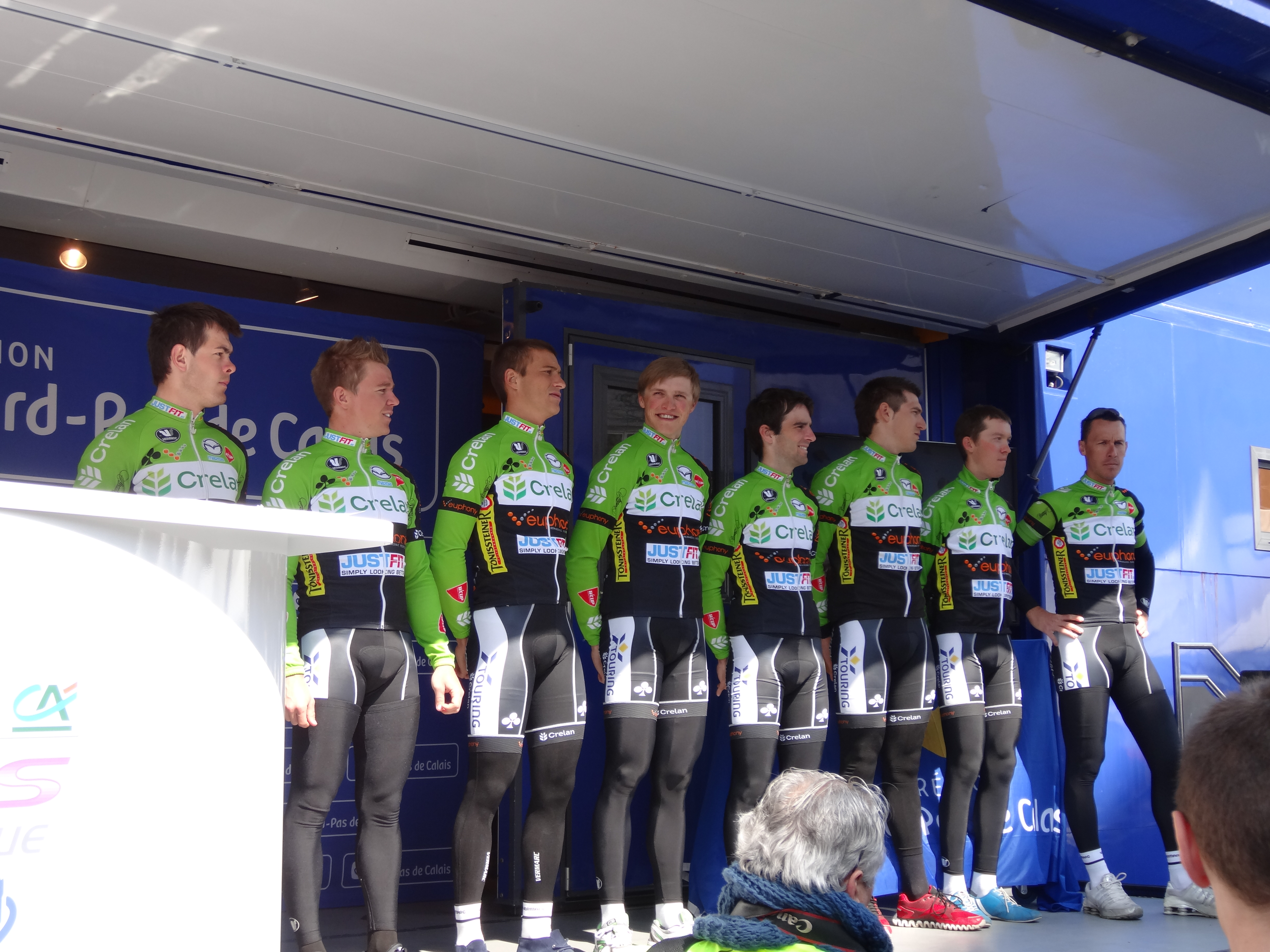 Reportage photographique réalisé le mercredi 1er mai 2013 au départ de la première étape de l'édition 2013 des Quatre jours de Dunkerque à Dunkerque, Nord, Nord-Pas-de-Calais, France. Le dossier photographique montre des véhicules de course exposés, la caravane publicitaire, la présentation des coureurs, et le départ. Depicted people: Kevin Claeys, Kevin Peeters, Jonathan Breyne, Egidijus Juodvalkis and Baptiste Planckaert